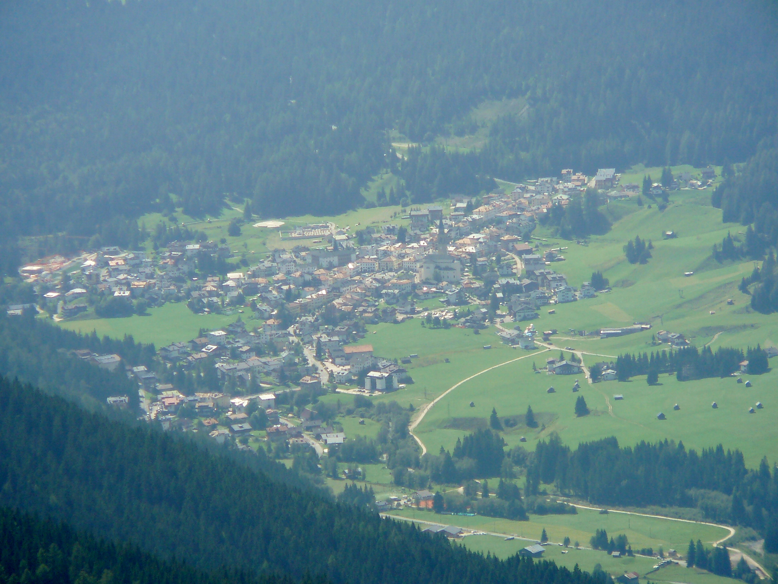 Padola vista dal Col Quaternà